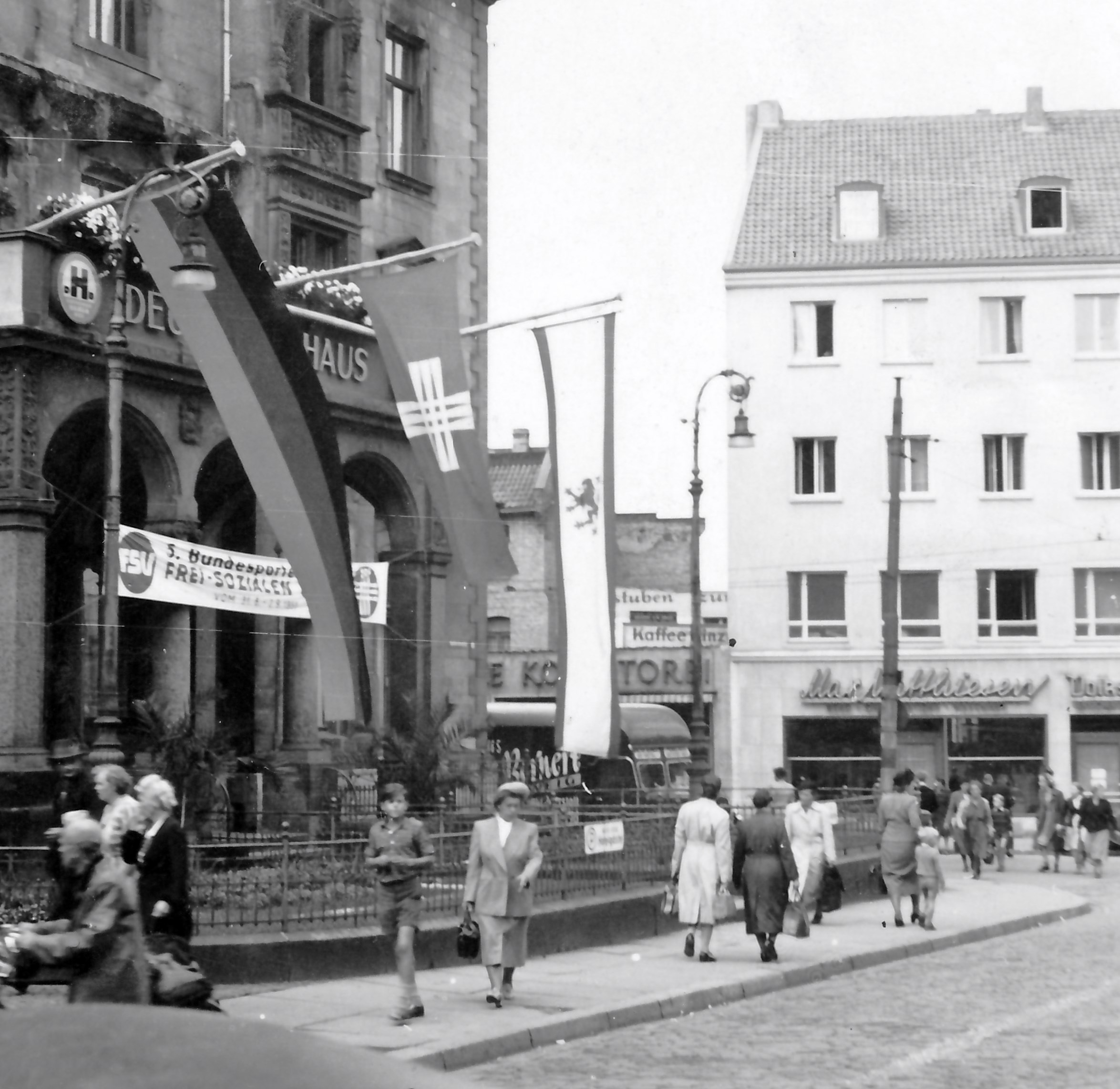 Hotel Deutsches Haus in Braunschweig - mit Spruchband und Symbolen geschmückt anlässlich des 5. Bundesparteitages der Frei-Sozialen Union (August 1951)